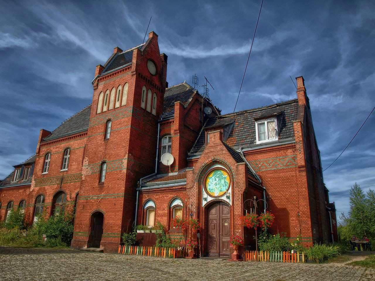 Przemków - dworzec kolejowy Przemków Odlewnia, obecnie nieużytkowany, kon. XIX